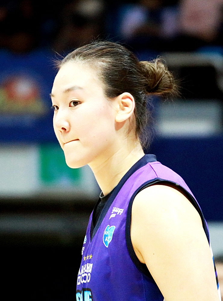 160110 여자농구 신한은행 vs 삼성생명 직찍 1